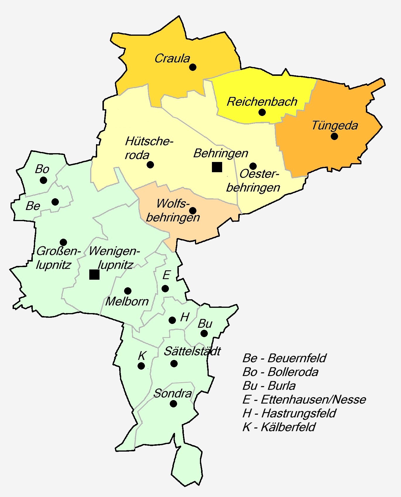 Kartensatz zur Gemeindeentwicklung